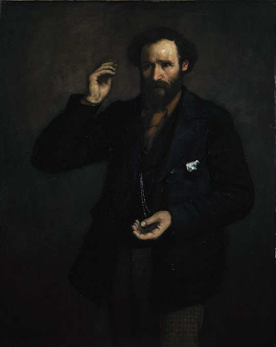 James Keir Hardie, 1856 - 1915. Labour leader.